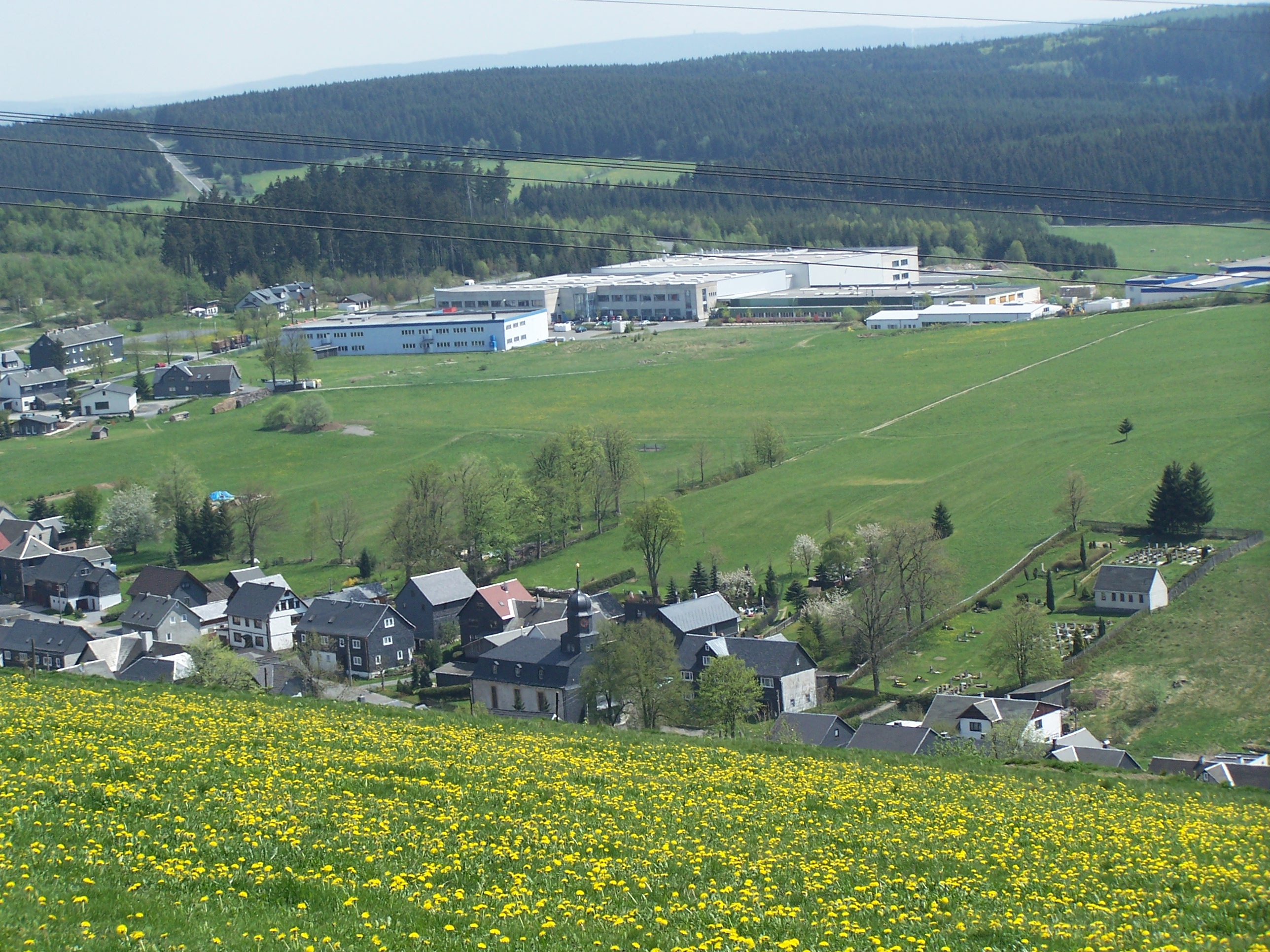 Das Rennsteigdörfchen Spechtsbrunn im Frühling. Im Hintergrund ist das moderne Gewerbegebiet zu sehen.